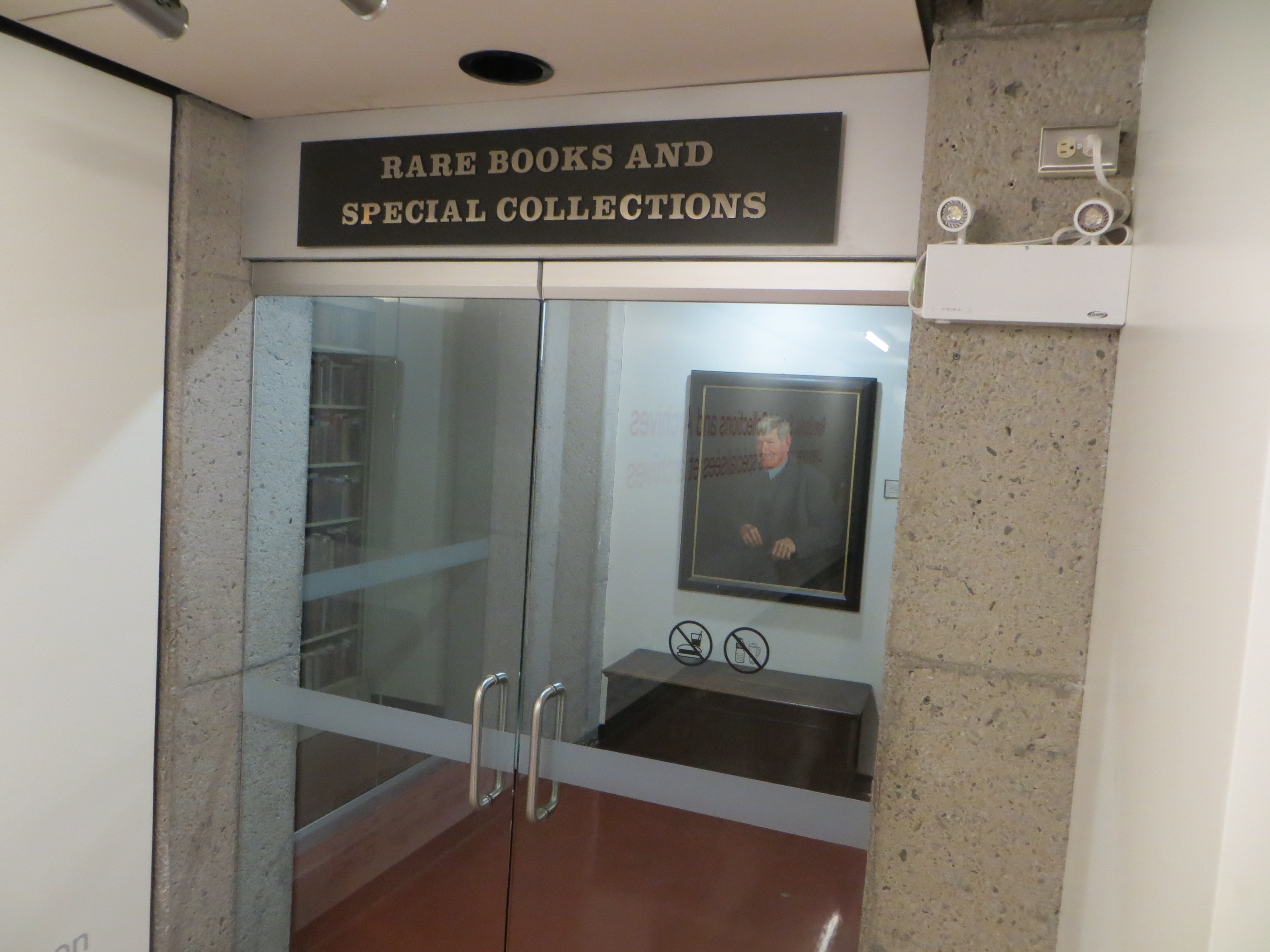 Бібліотека раритетних видань Університету МакГілл (Монреаль)